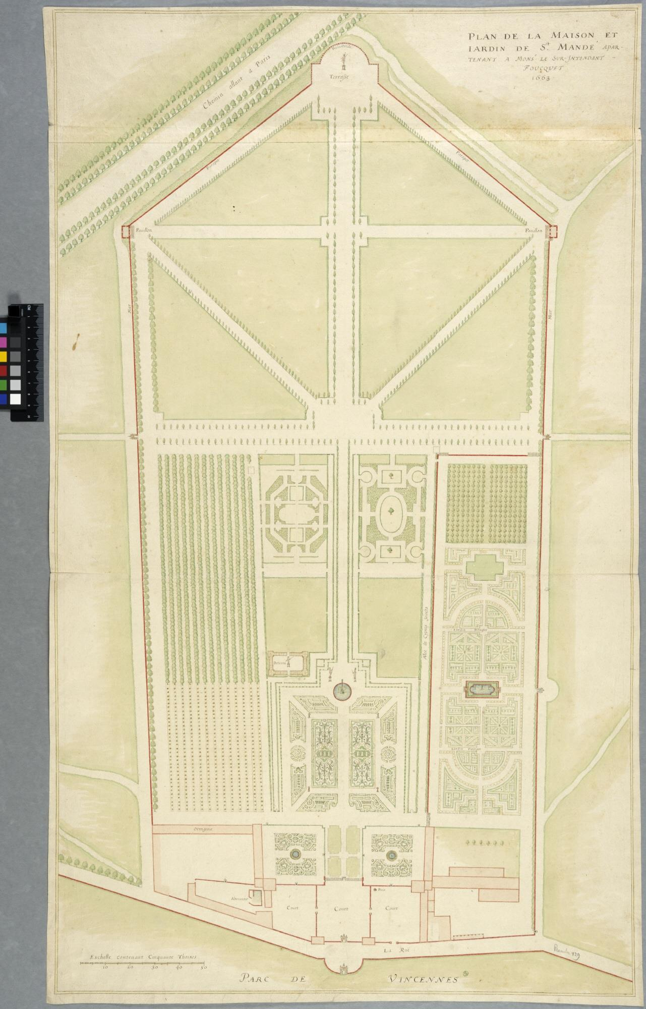 Plan de la propriété de Fouquet à Saint-Mandé, daté de 1663. Nationalmuseum, Stockholm.